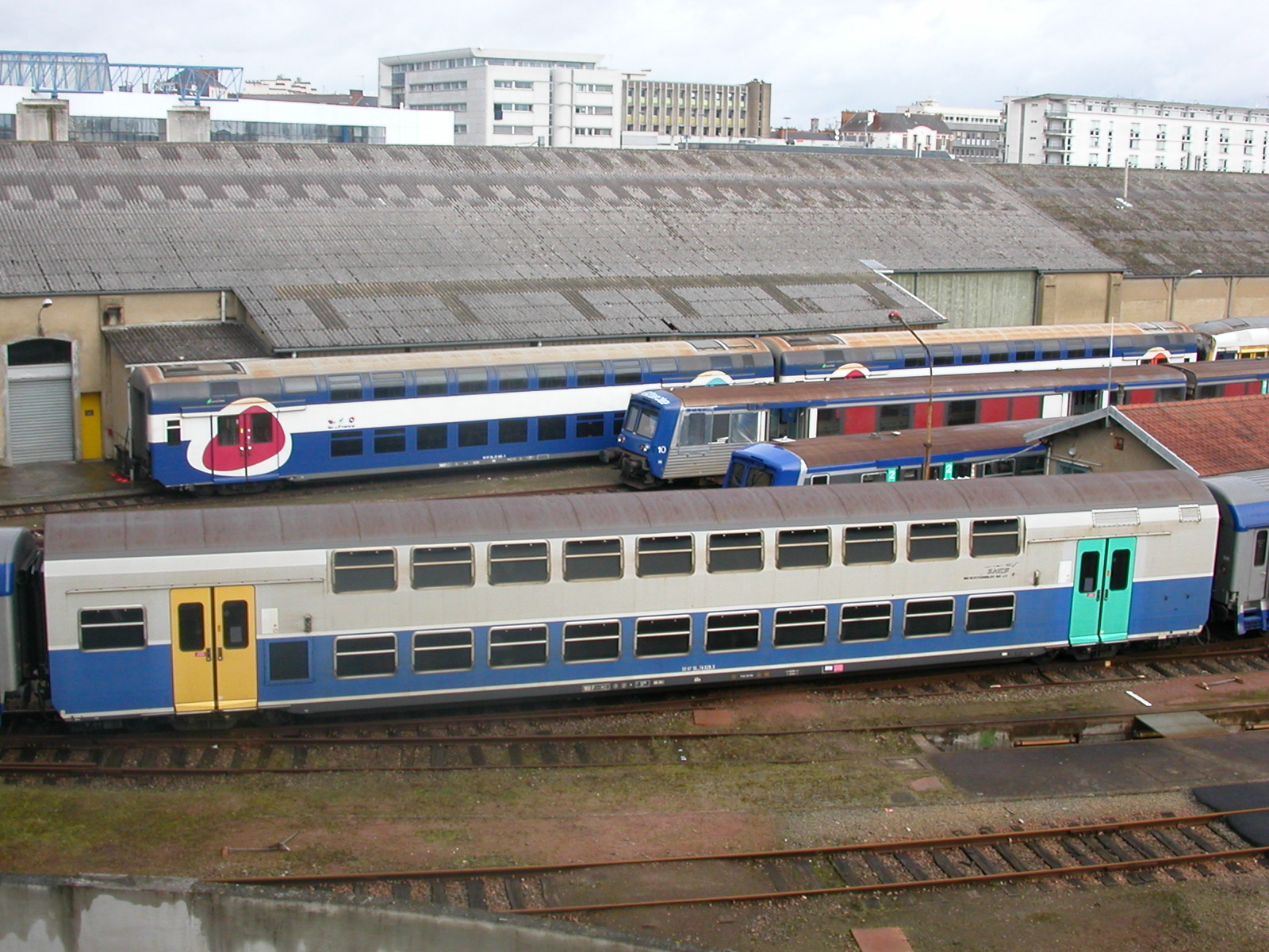 Ateliers SNCF de la gare de Rennes